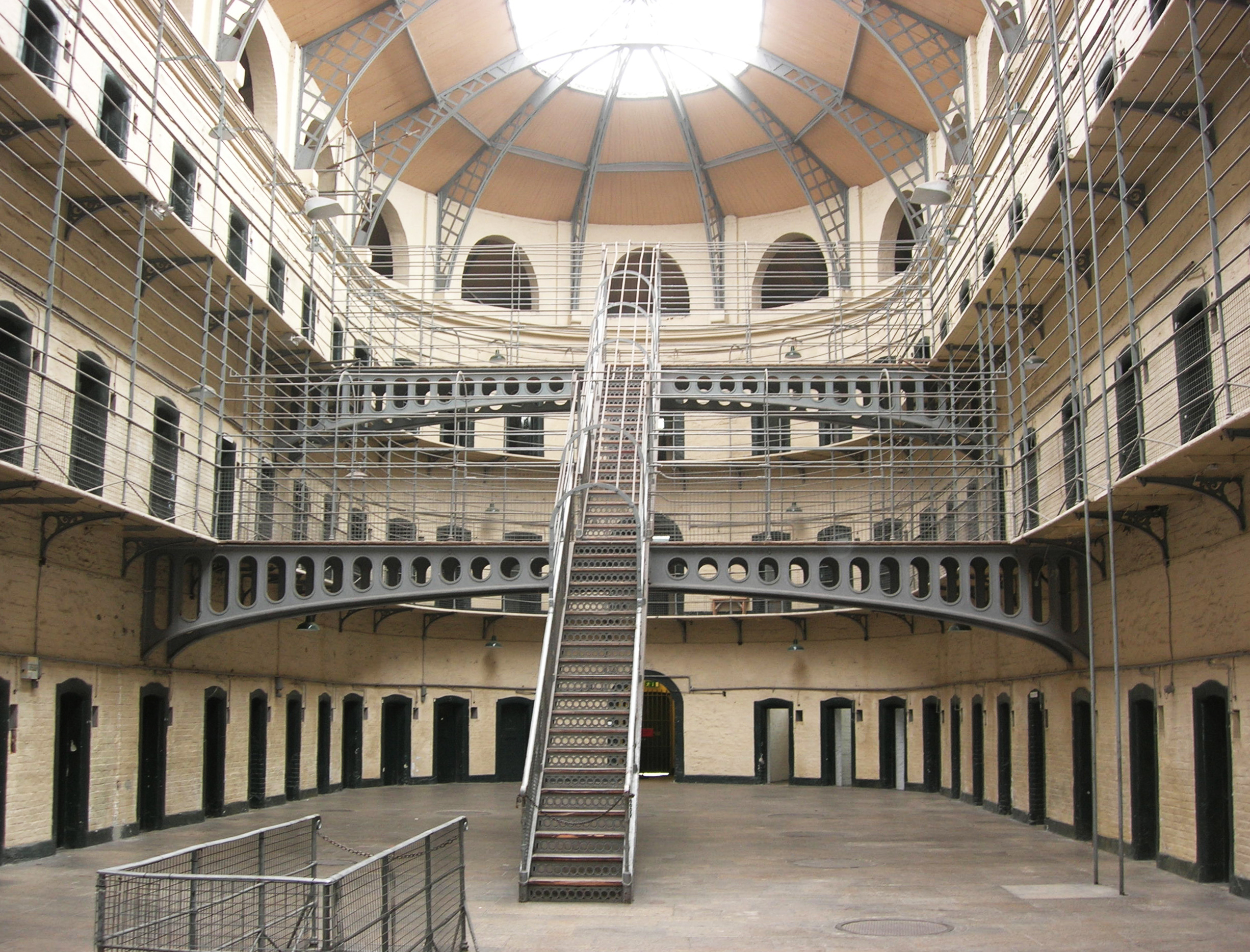 Description =Cour intérieure de la prison de Kilmainham Source =Photo taken by Remi Jouan Date =Mai 2006 Author =Remi Jouan